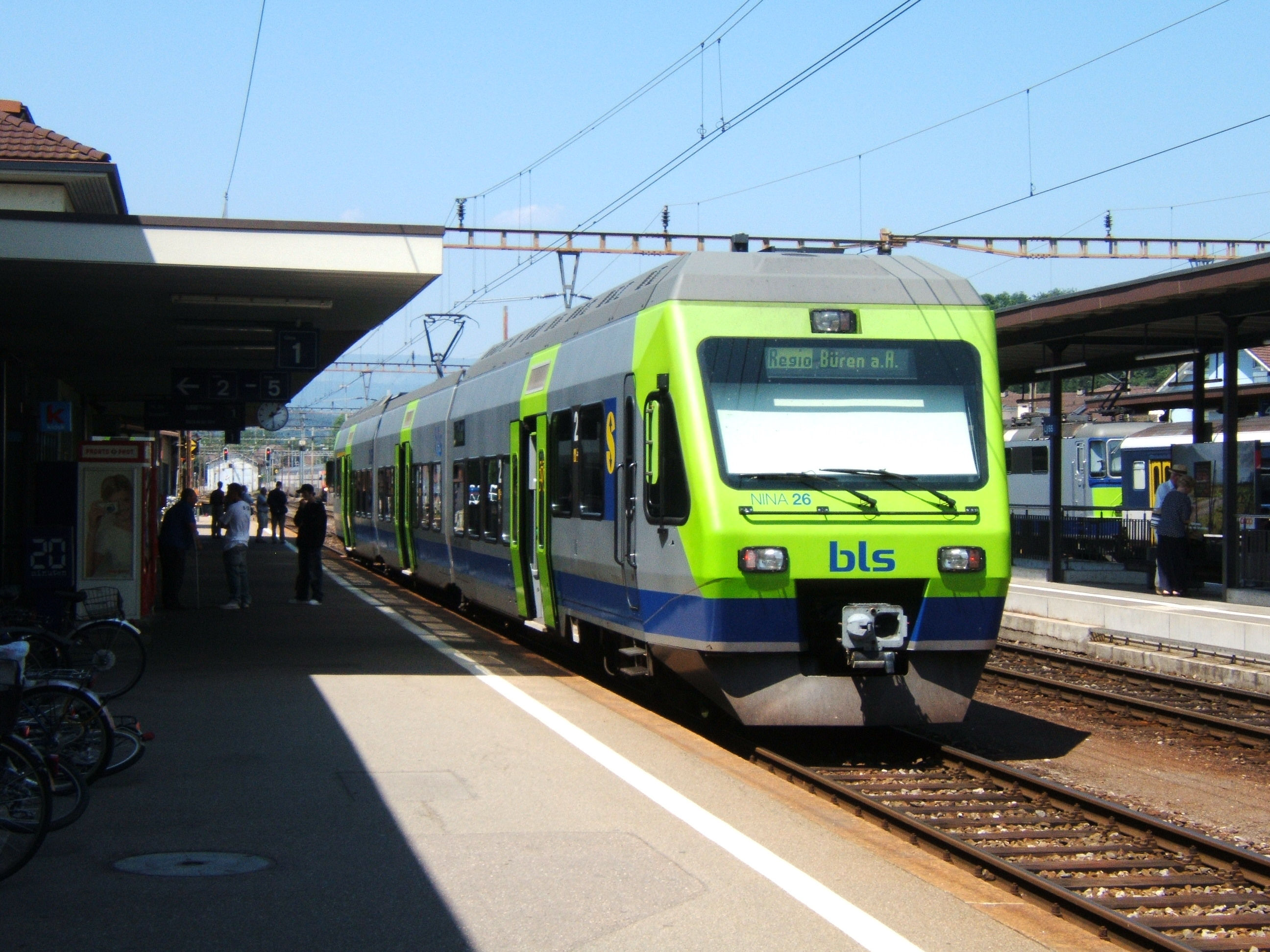 BLS NINA trein in Lyss station